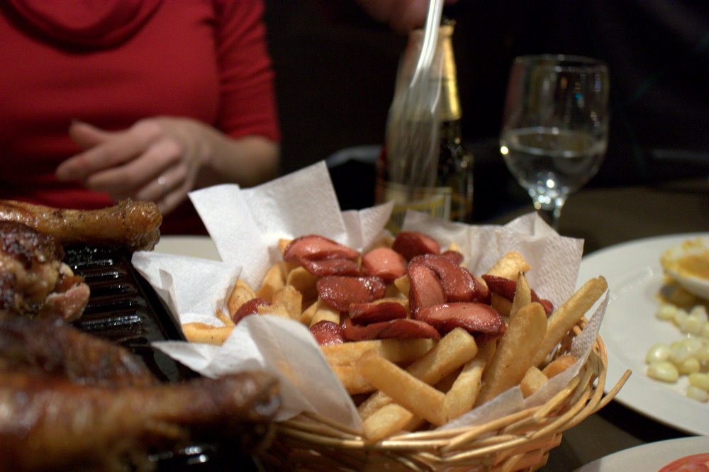 Salchipapas servidas en el restaurante Urubamba de Queens, Estados Unidos